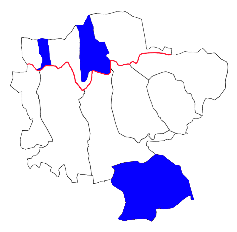 Il territorio di Lusiana Conco all'interno dei Sette Comuni. In rosso la linea di demarcazione del vecchio consorzio della Reggenza.